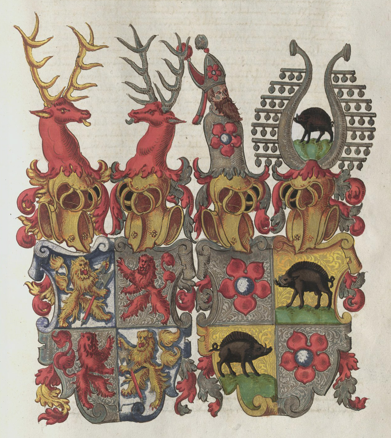 Wappen aus der Zimmerischen Chronik, Handschrift B, Württembergische Landesbibliothek Stuttgart, Cod. Don. 580b, S. 879, Allianzwappen Zimmern / Eberstein